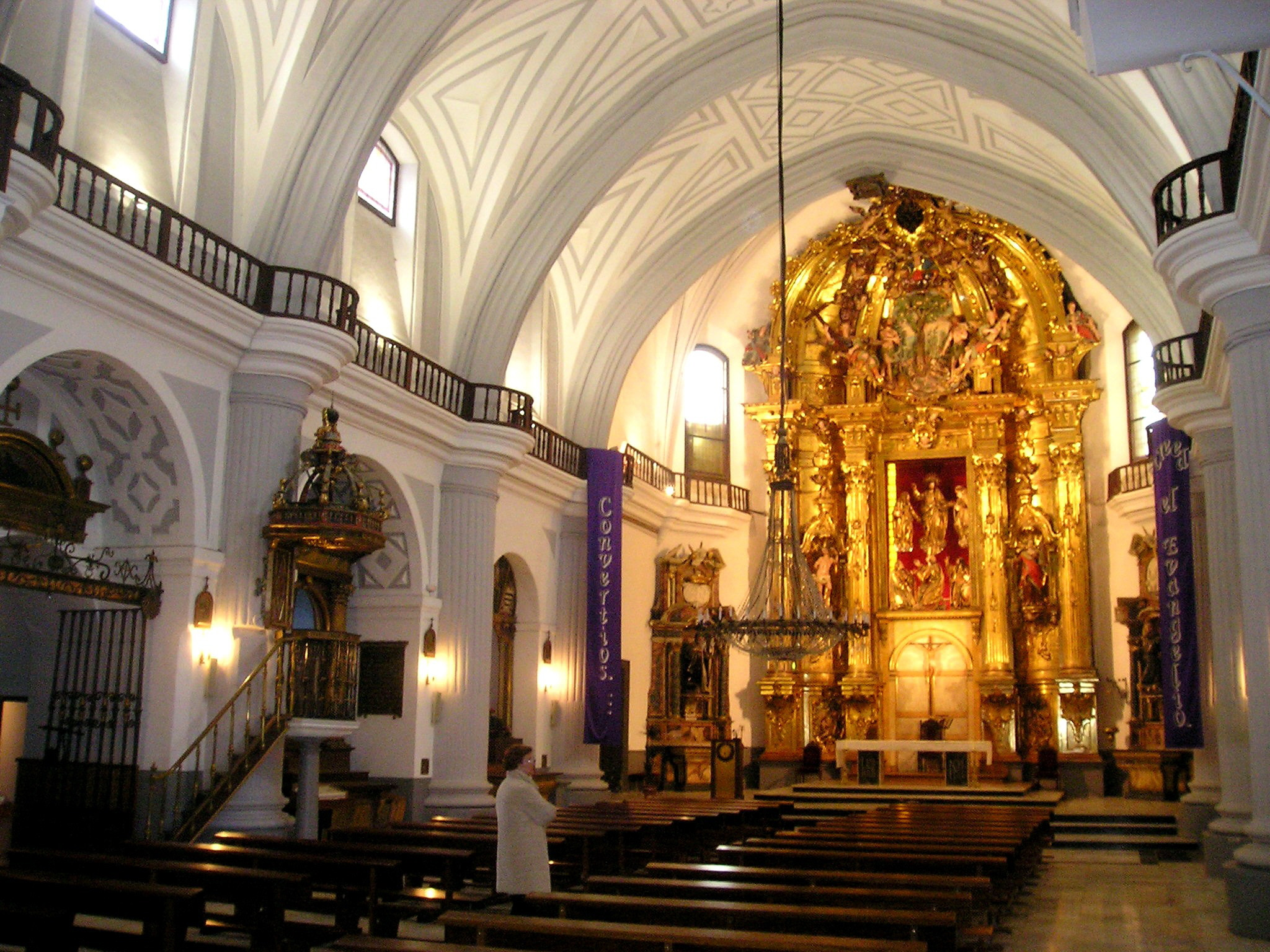 Interior de la iglesia de El Salvador, con vista de la cabecera y retablo.